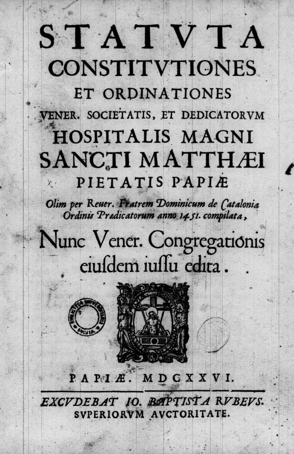 Frontespizio